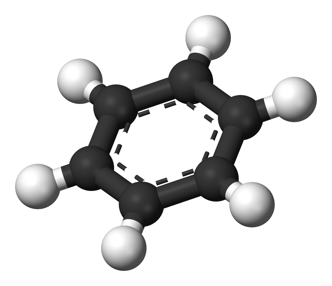 Молекула бензола